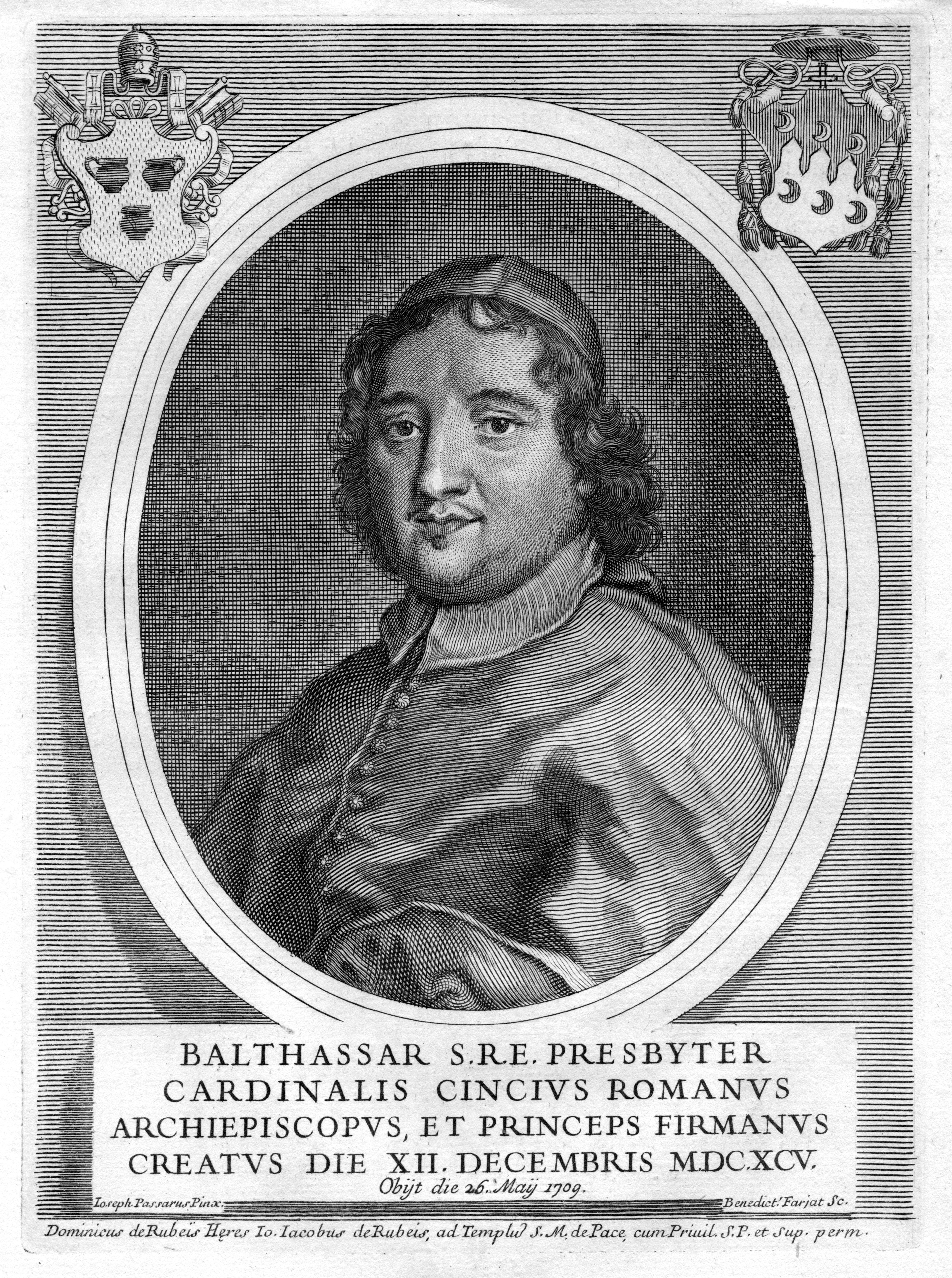 portrait gravé